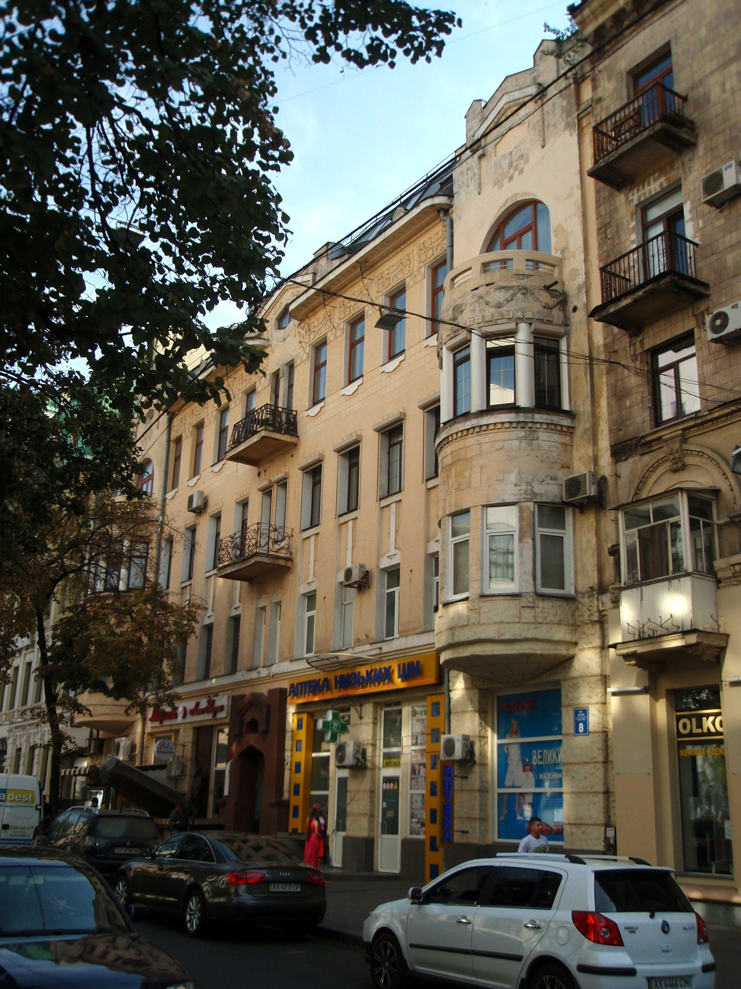 Житловий будинок, Харків, вул. Іванова, 8